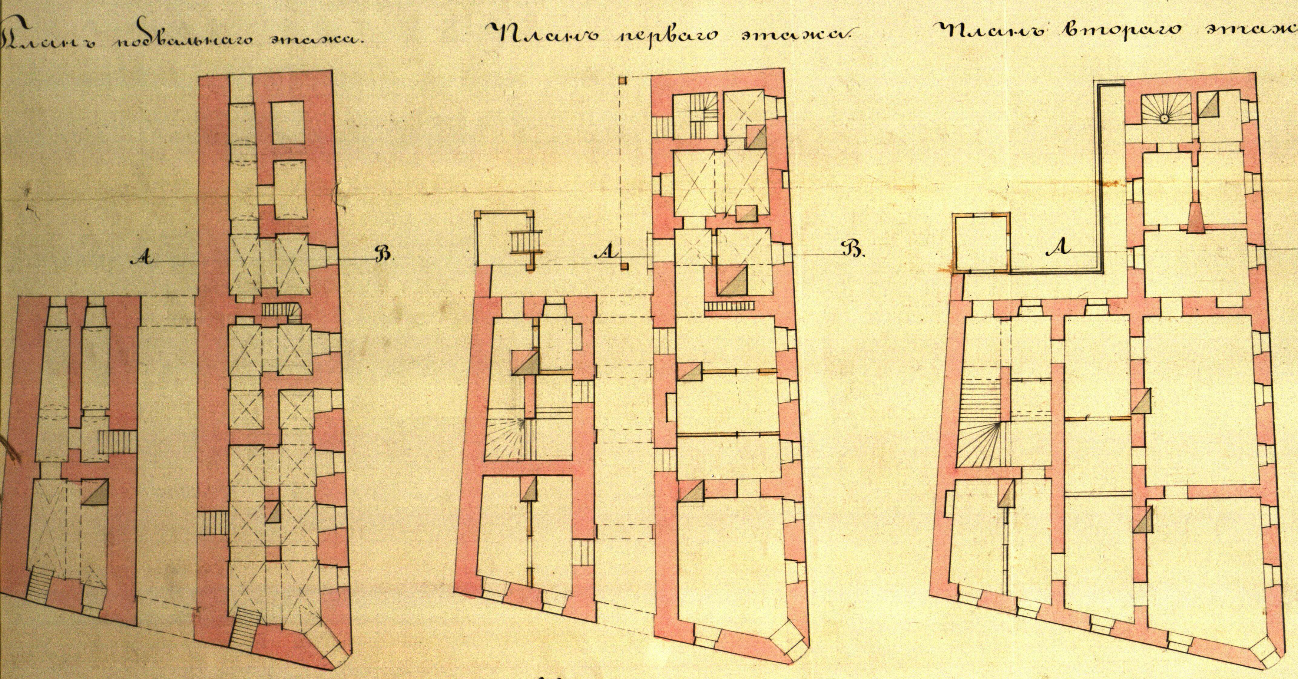 Беларуская (тарашкевіца): Менск (Miensk), рог завулку Музычнага (zavułak Muzyčny) і вуліцы Малой Бэрнардынскай (vulica Małaja Bernardynskaja)